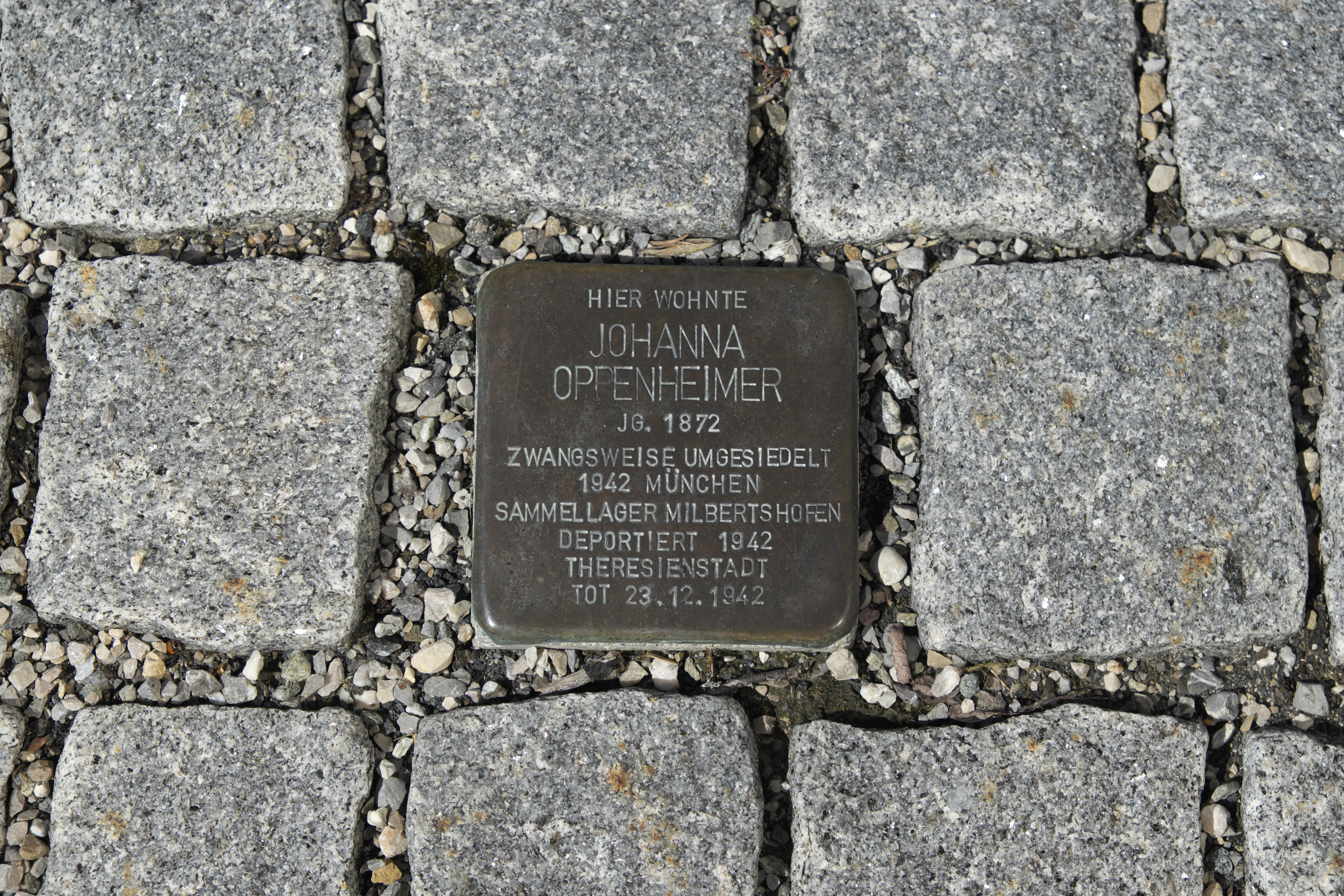 Stolperstein für Johanna Oppenheimer vor dem Rathaus, Scherrerhaus, in Schöngeising im Landkreis Fürstenfeldbruck (Bayern/Deutschland)